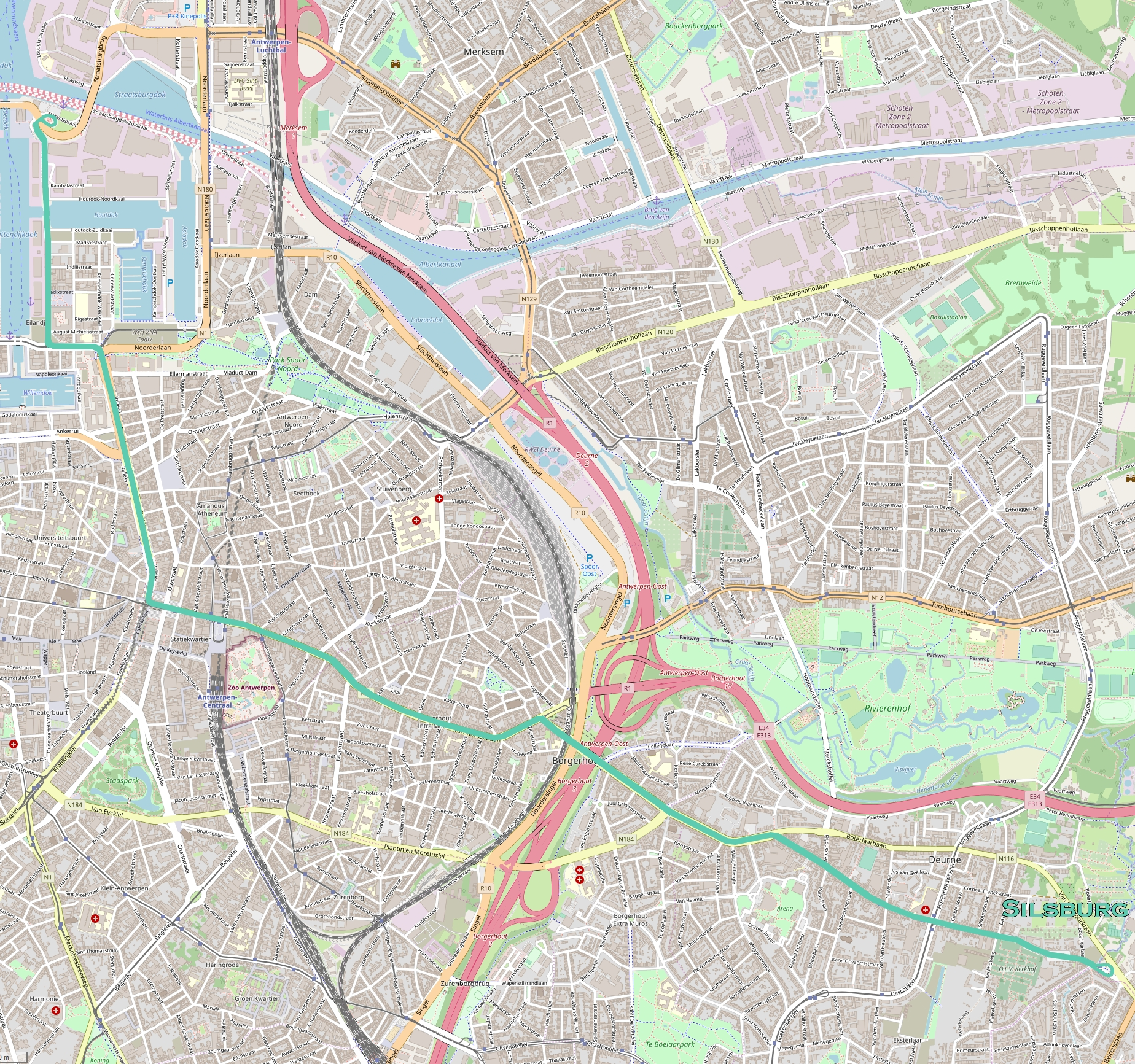 Tracé de la ligne 24 du tramway d'Anvers entre Stenenbrug et Havenhuis, en usage à partir de novembre 2019. This map may be incomplete, and may contain errors. Don't rely solely on it for navigation.